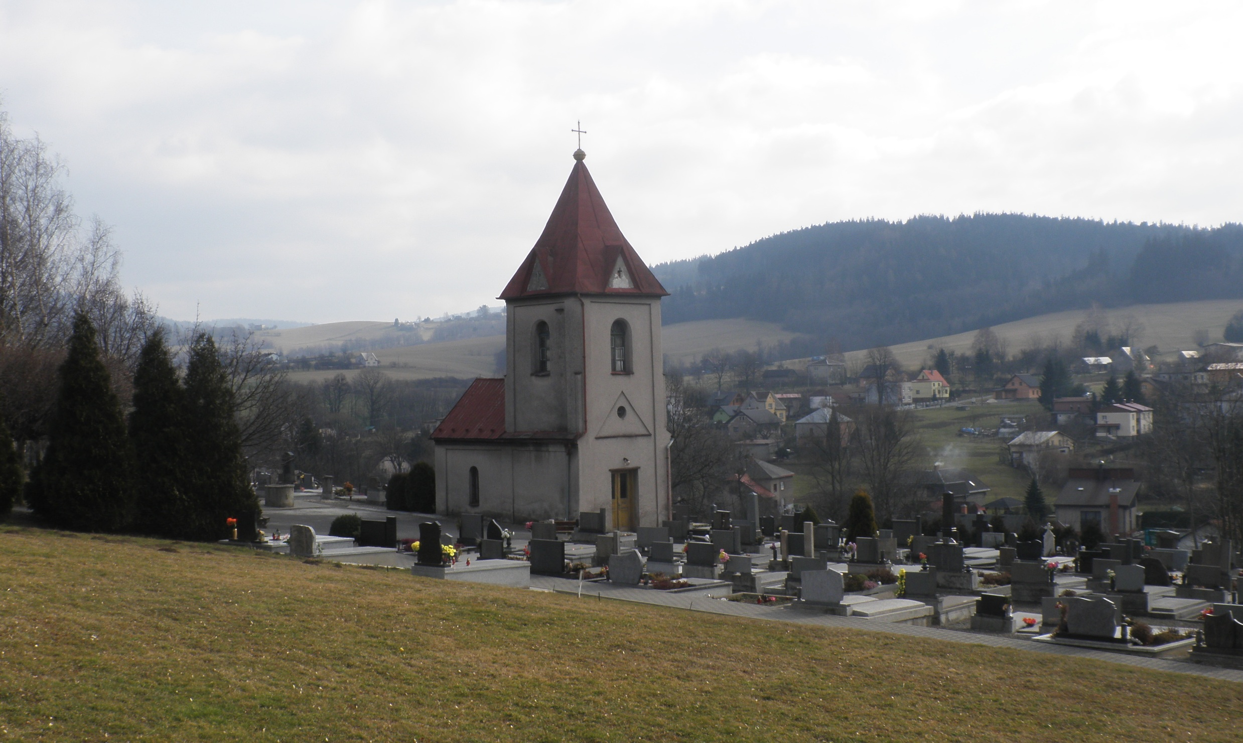 Vendryně (okr. Frýdek-Místek), evangelický hřbitov s kaplí